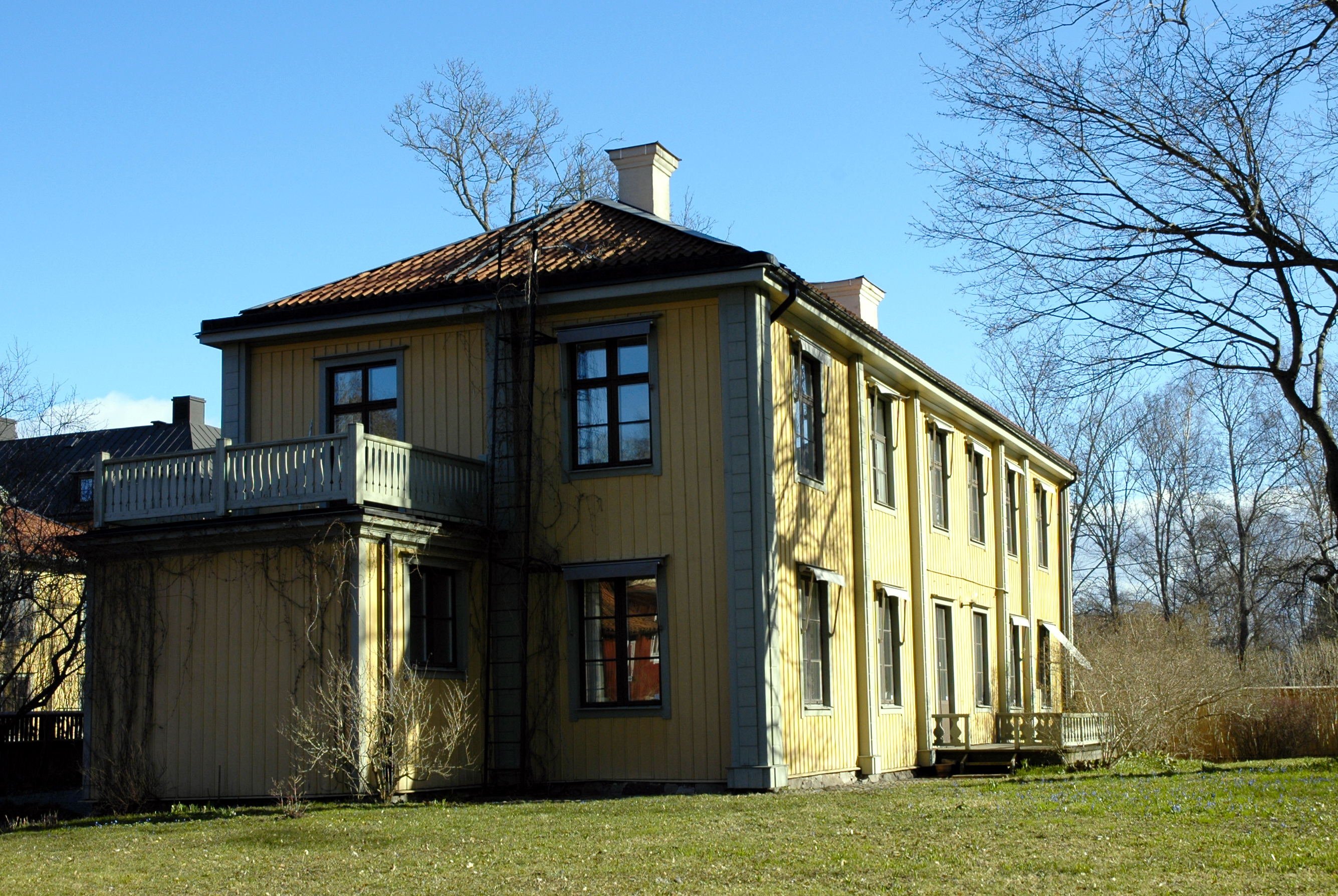 Photo of Dag Hammarskjöld centre, Övre Slottsgatan 2, Uppsala